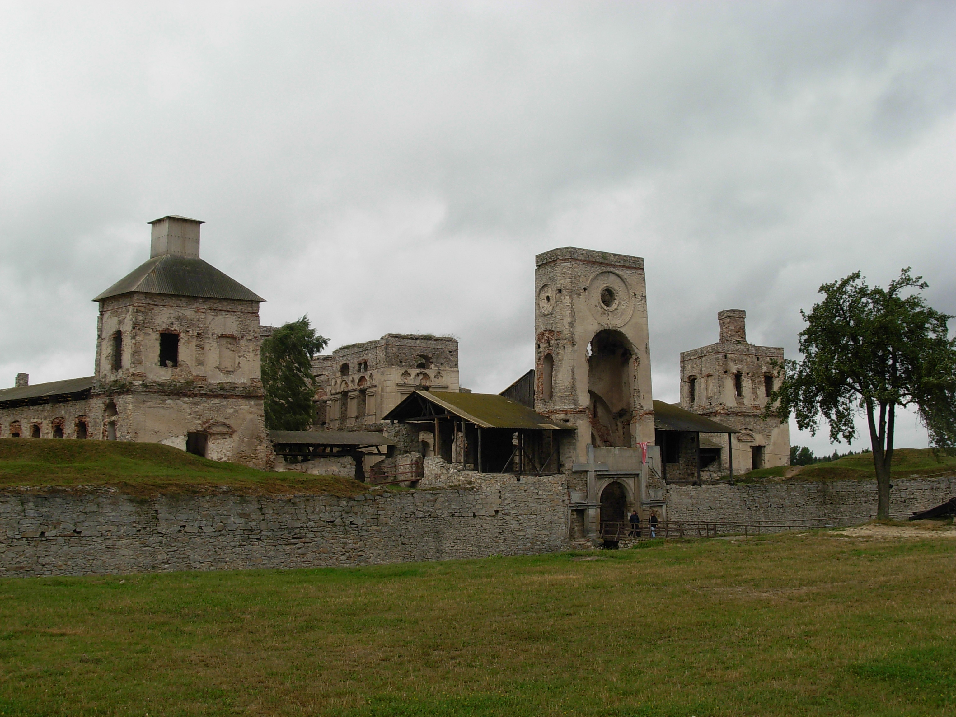 Krzyżtopór Castle in Ujazd village, Poland.